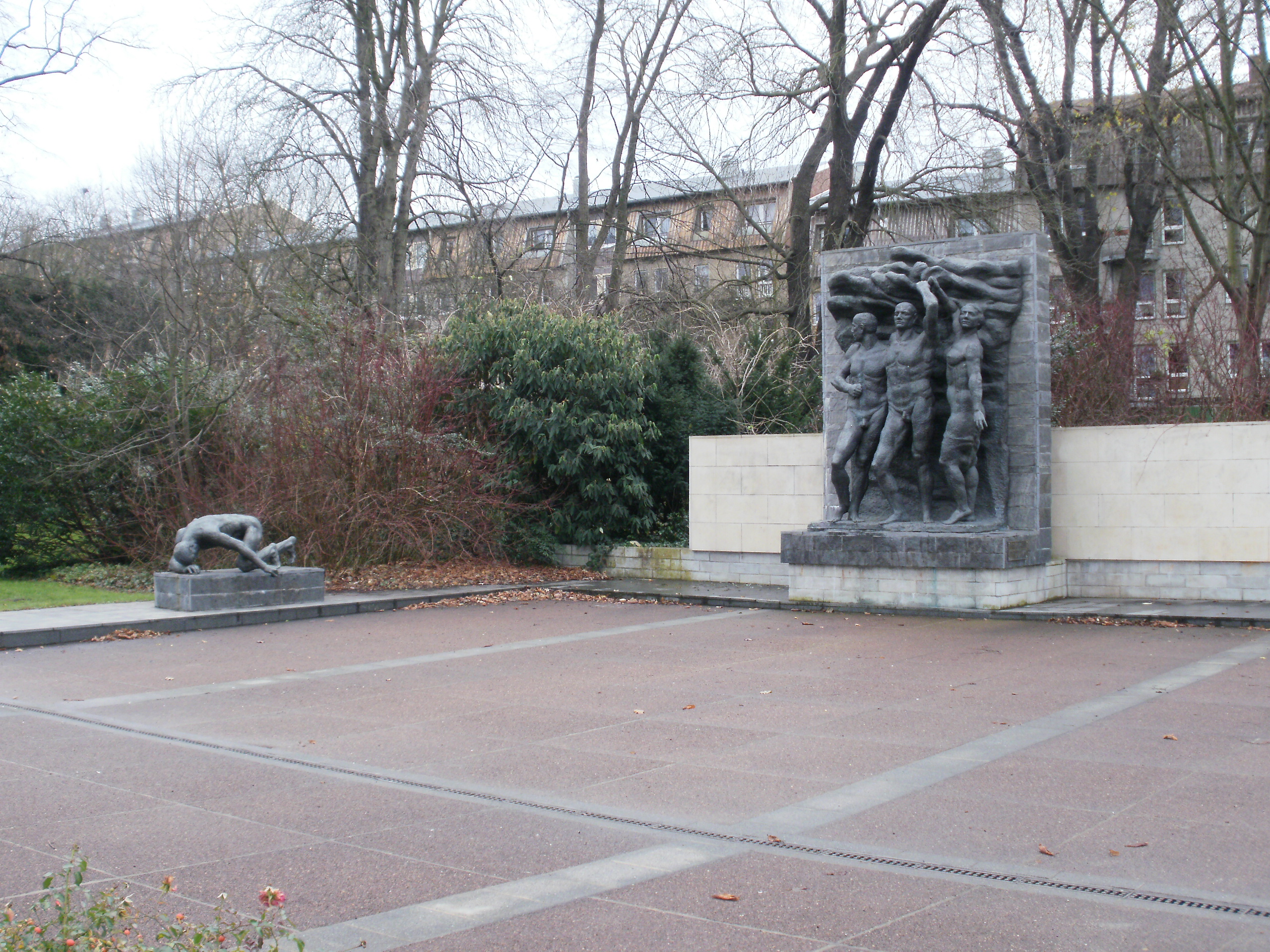 Ehrenhain für die Opfer des Faschismus. Puschkinpromenade in Cottbus